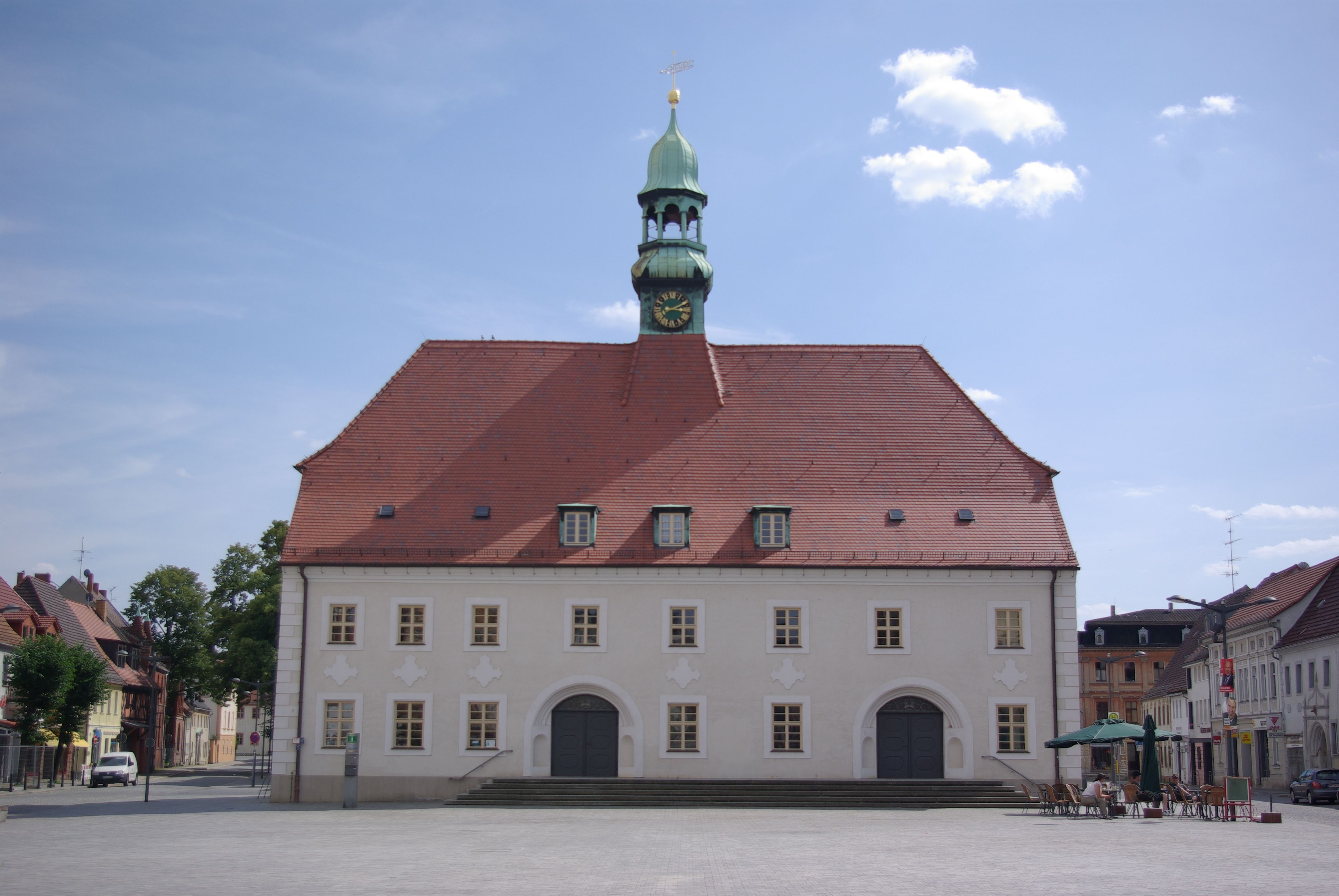 Finsterwalde in Brandenburg. Das Rathaus am Markt ist, wie der gesamte Marktplatz, Denkmalgeschützt. Das Rathaus wurde 1739 errichtet.